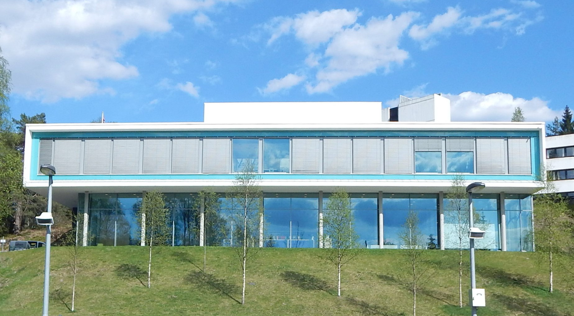 Riksarkivet ved Sognsvann i Oslo